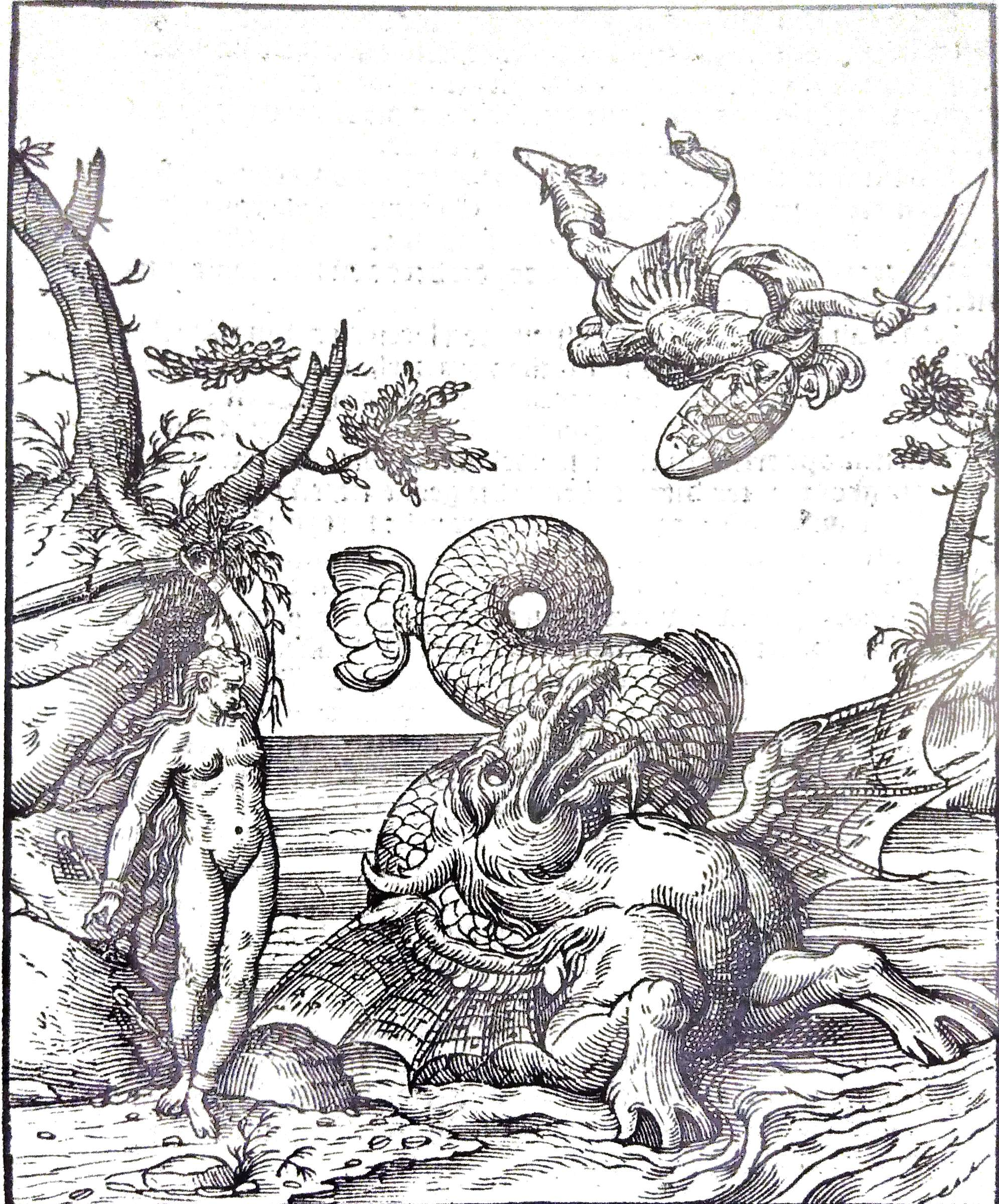 Voorstelling opgevoerd aan de Willebroekse Vaart door 't Mariacranske, met Perseus als Willem van Oranje die Andromeda (de Nederlanden) bevrijdt van het zeemonster (Spanje). Onderdeel van de intocht van Willem van Oranje te Brussel, 18 september 1577. Prent uit J. B. Houwaert, Declaratie van die triumphante incompst vande doorluchtighen ende hoogheboren Prine van Oraingnien, binnen die princelijcke stadt van Brussele, geschiet in t' iaer 1578, den 18 Septembris, Christoffel Plantijn, Antwerpen, 1579